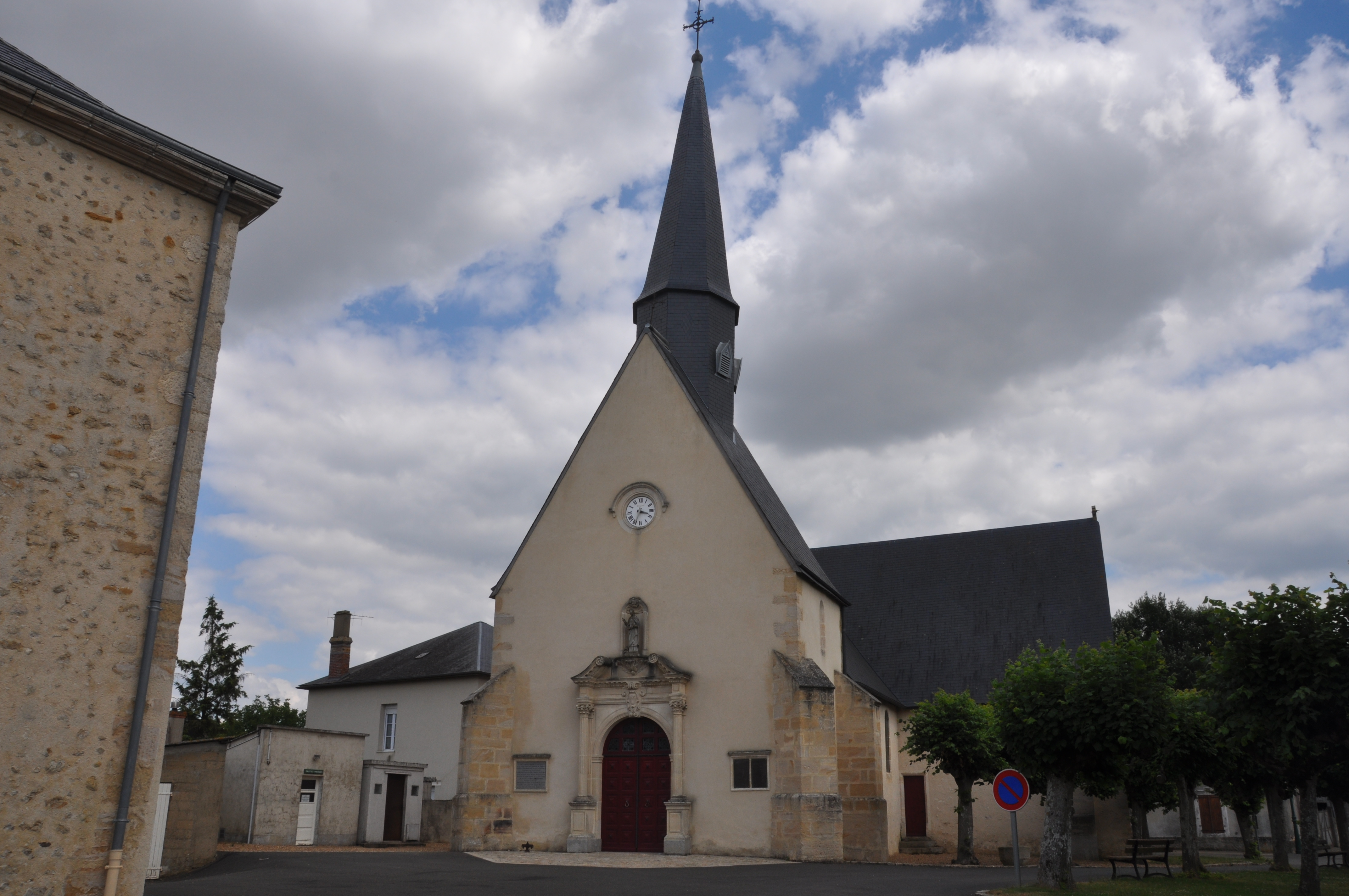 au coeur de commune , ce monument historique a su resister au temps